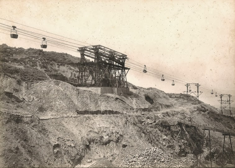 Orconera Iron Ore Company Limited - Aireko tranbia eta Pobeñako garbilekua Deskribapen zehatzak ikus ditzakezu hemen